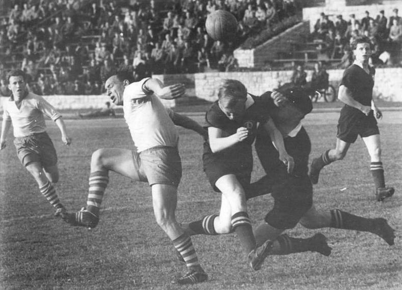 Zentralbild-Beyer Bey-Krz. 30.5.1957 Vorwärts Berlin siegte im FDGB-Pokalspiel - Am Mittwoch, dem 29.5.1957, standen sich im Berliner Friedrich Ludwig Jahn-Stadion in einem FDGB-Pokalspiel der Fußballer der ASK Vorwärts Berlin und Dynamo Dresden gegenüber. Der Oberligavertreter Vorwärts hatte wenig Mühe, um sich durch einen 5:1-Sieg für die nächste Runde zu qualifizieren. UBz: Der Berliner Mittel-Stürmer Assmy (links) kommt vor den Dresdener Abwehrspielern Ittner (Mitte) und Torwart Klaus an den Ball, aber sein abgefälschter Schuss verfehlte knapp das Ziel.